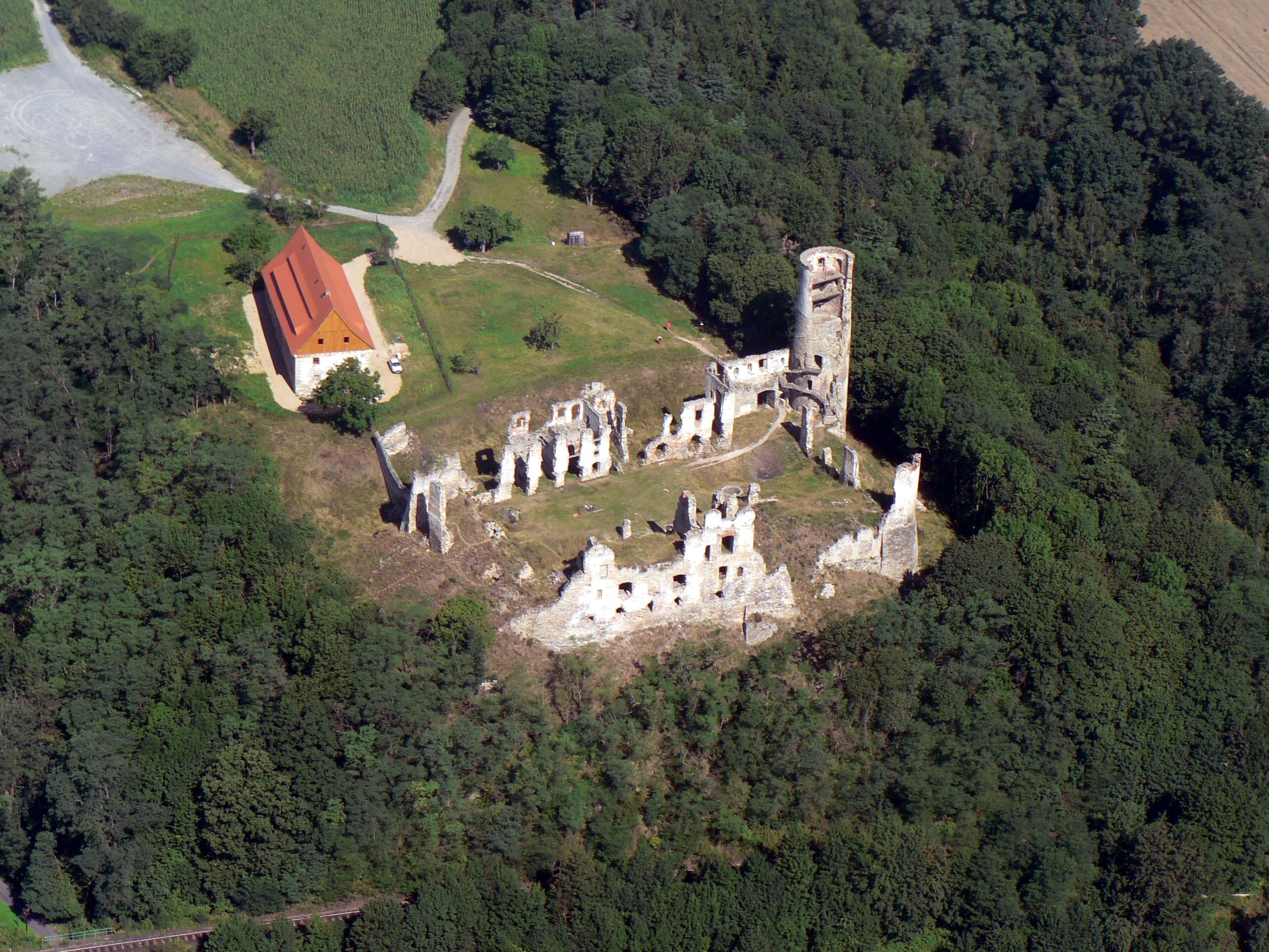 Letecký pohled na zříceninu hradu Zvířetice z východu